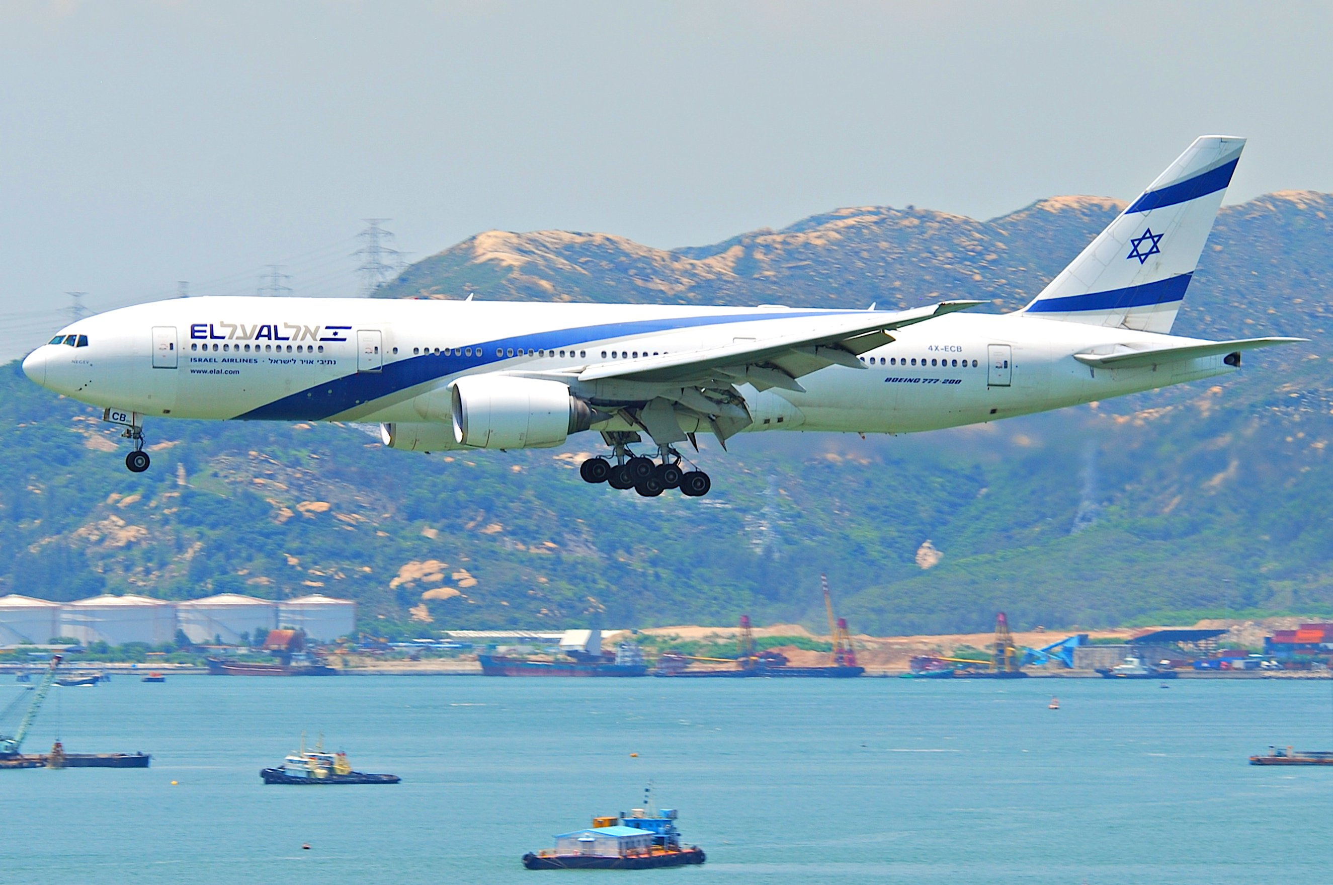 El Al Boeing 777-258ER; 4X-ECB@HKG;04.08.2011/615mu